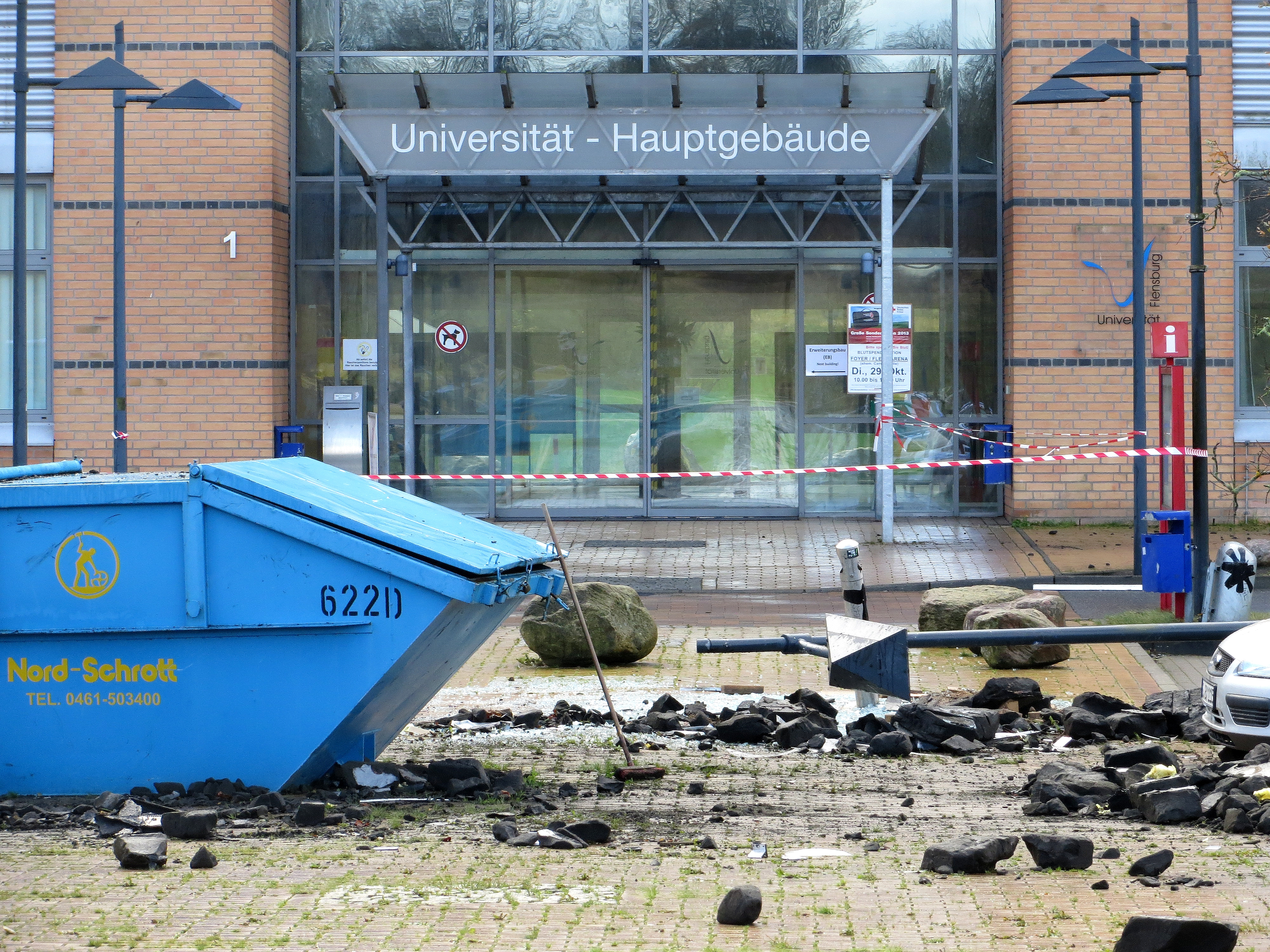 Universität, Flensburg, Hauptgebäude, Haupteingang, stürmischer Herbst 2013; Dachschäden durch den Sturm Christian